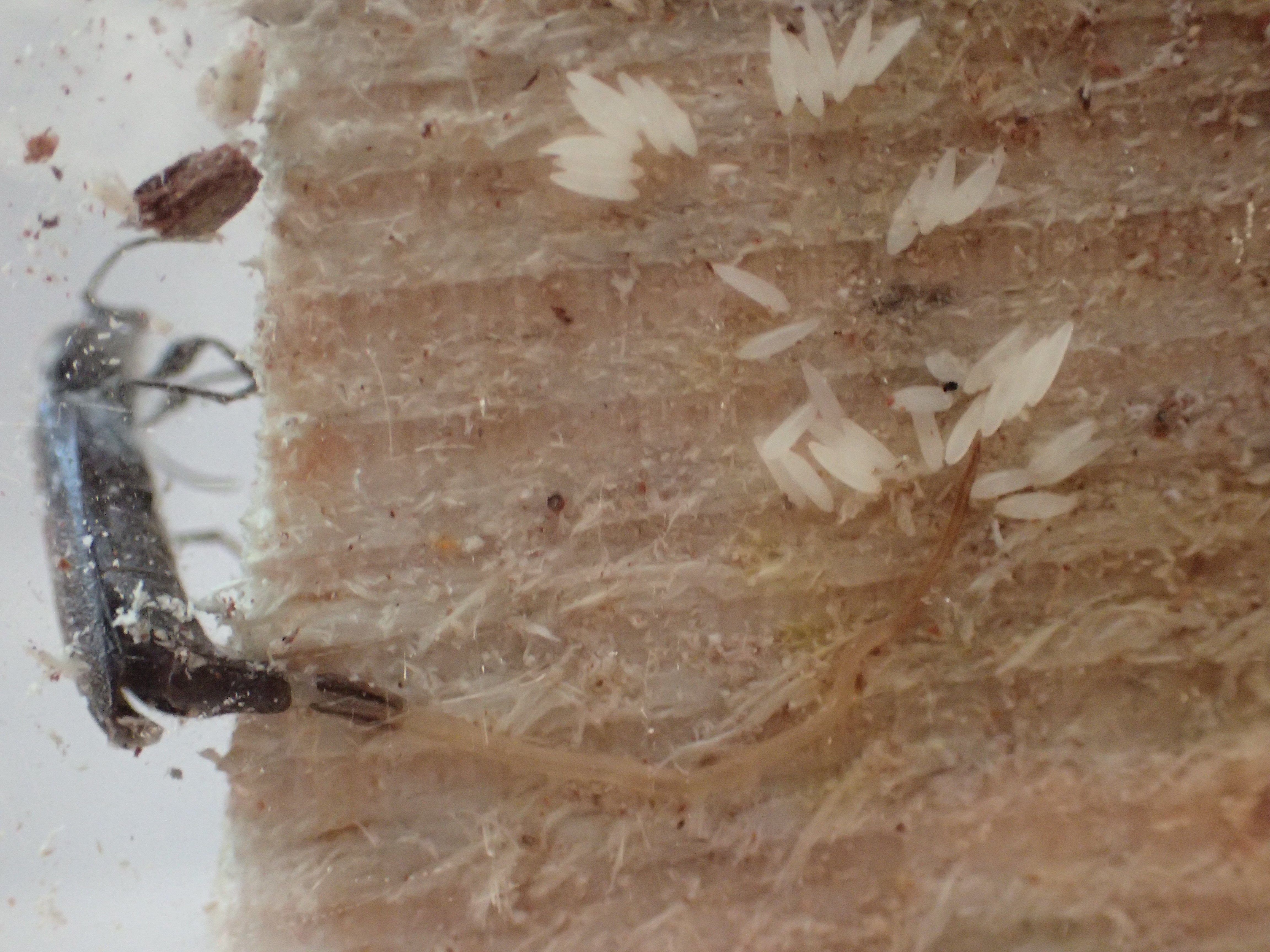 Eggleggende husbukkhunn, med et langt eggleggingsrør i en sprekk mellom treverk og en glassplate.